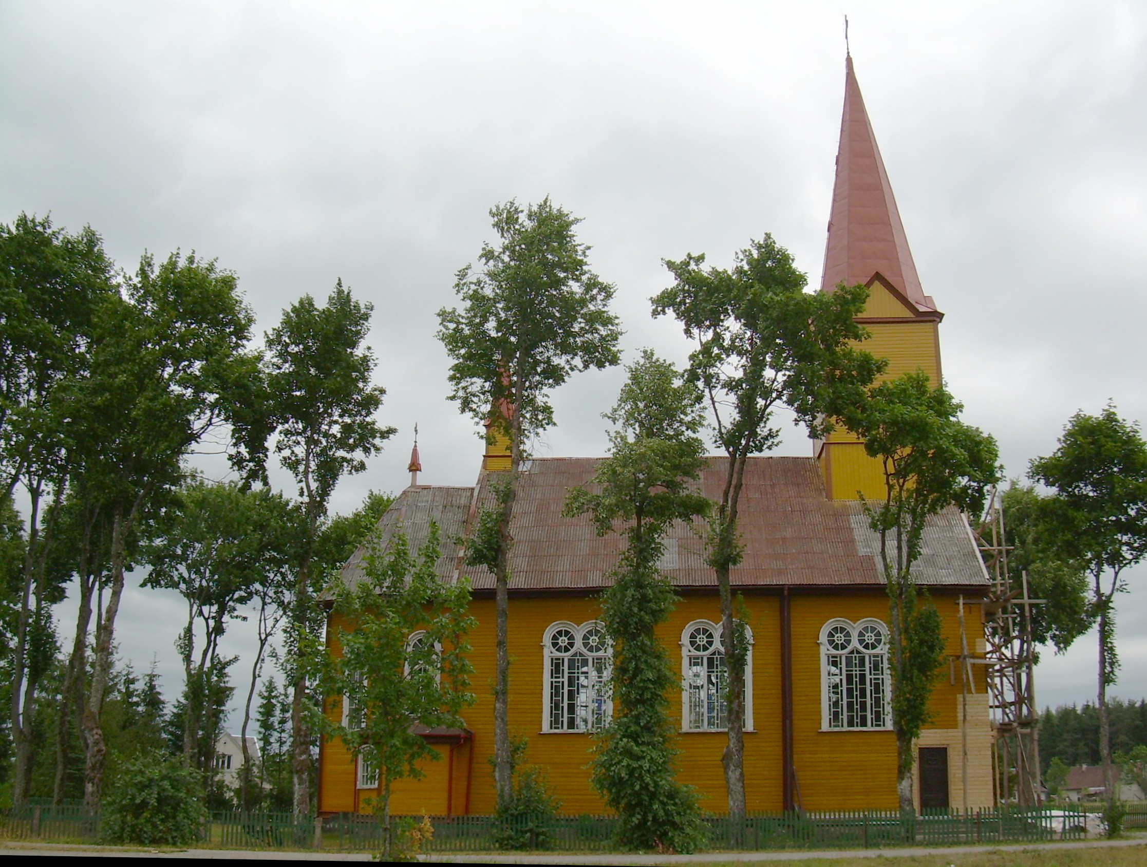 Stalgėnų Šv. apaštalų Petro ir Pauliaus bažnyčia